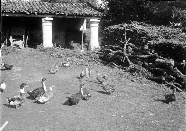 Fonds Trutat - Photographie ancienne Cote : TRU C 868 Localisation : Fonds ancien (S 30) Original non communicable Titre : La cour et les canards, Bélesta Auteur : Trutat, Eugène Rôle de l’auteur : Photographe Lieu de création : Bélesta (commune de Cahuzac-sur-Vere) Date de création : 1859-1910 [entre] Mesures : : 9 x 12 cm Observations : Notes de la main de E. Trutat : "Zion, Jougla vieille" Mot(s)-clé(s) : -- Cour -- Canard -- Colonne -- Toit -- Arbre -- Racine -- Auvent -- Tuile -- Bélesta (commune de Cahuzac-sur-Vere) -- Cahuzac-sur-Vère (Tarn) -- Castelnau-de-Montmiral (Tarn ; canton) -- Midi-Pyrénées (France) -- 19e siècle, 2e moitié -- 20e siècle, 1e quart Médium : Photographies -- Négatifs sur plaque de verre -- Noir et blanc -- Jougla-Lumière -- Paysages -- Scènes animalières Bibliothèque de Toulouse. Domaine public